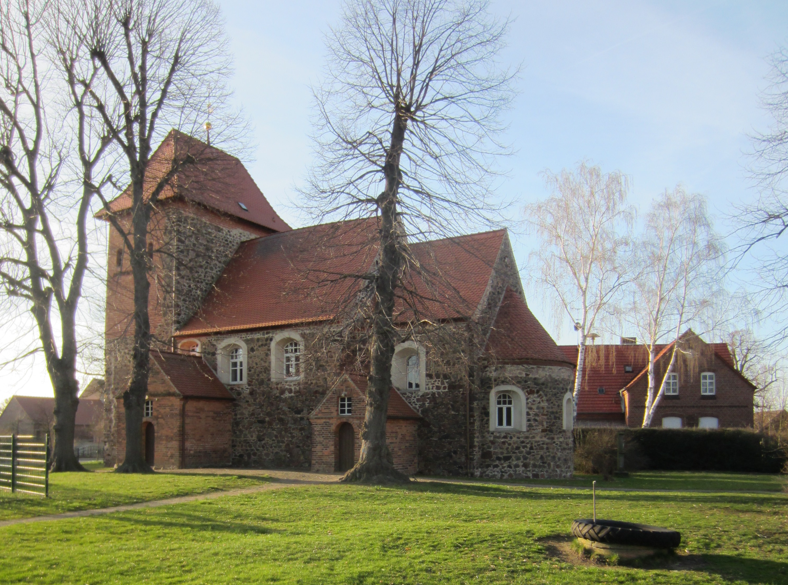 Rosenthal, Stadt Dahme/Mark, denkmalgeschützte Dorfkirche, Ansicht von Südosten